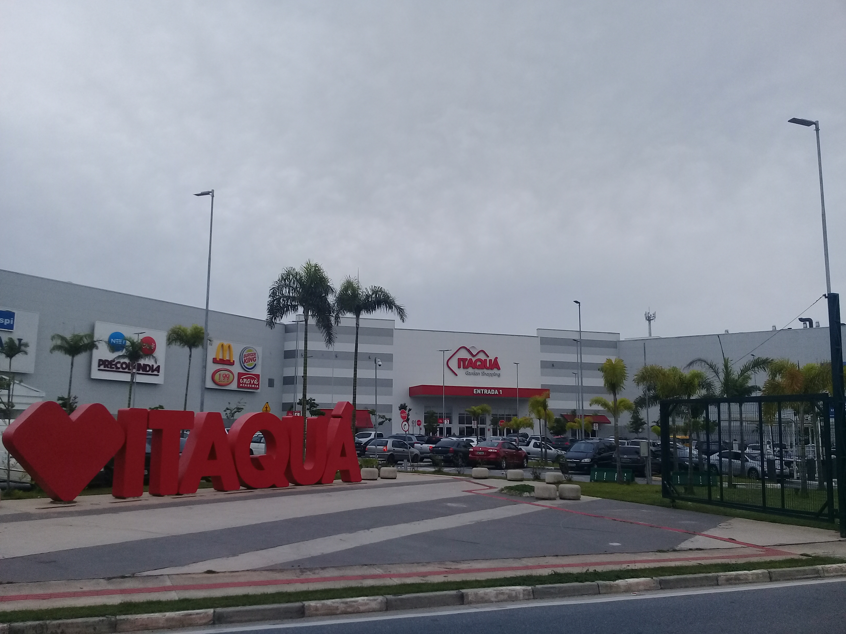 Itaquá Garden Shopping, Itaquaquecetuba, Brasil